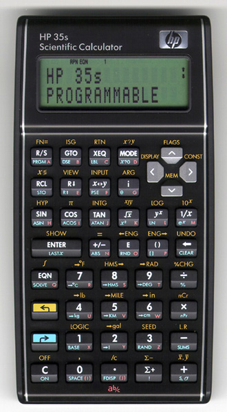 HP-35s Calculator